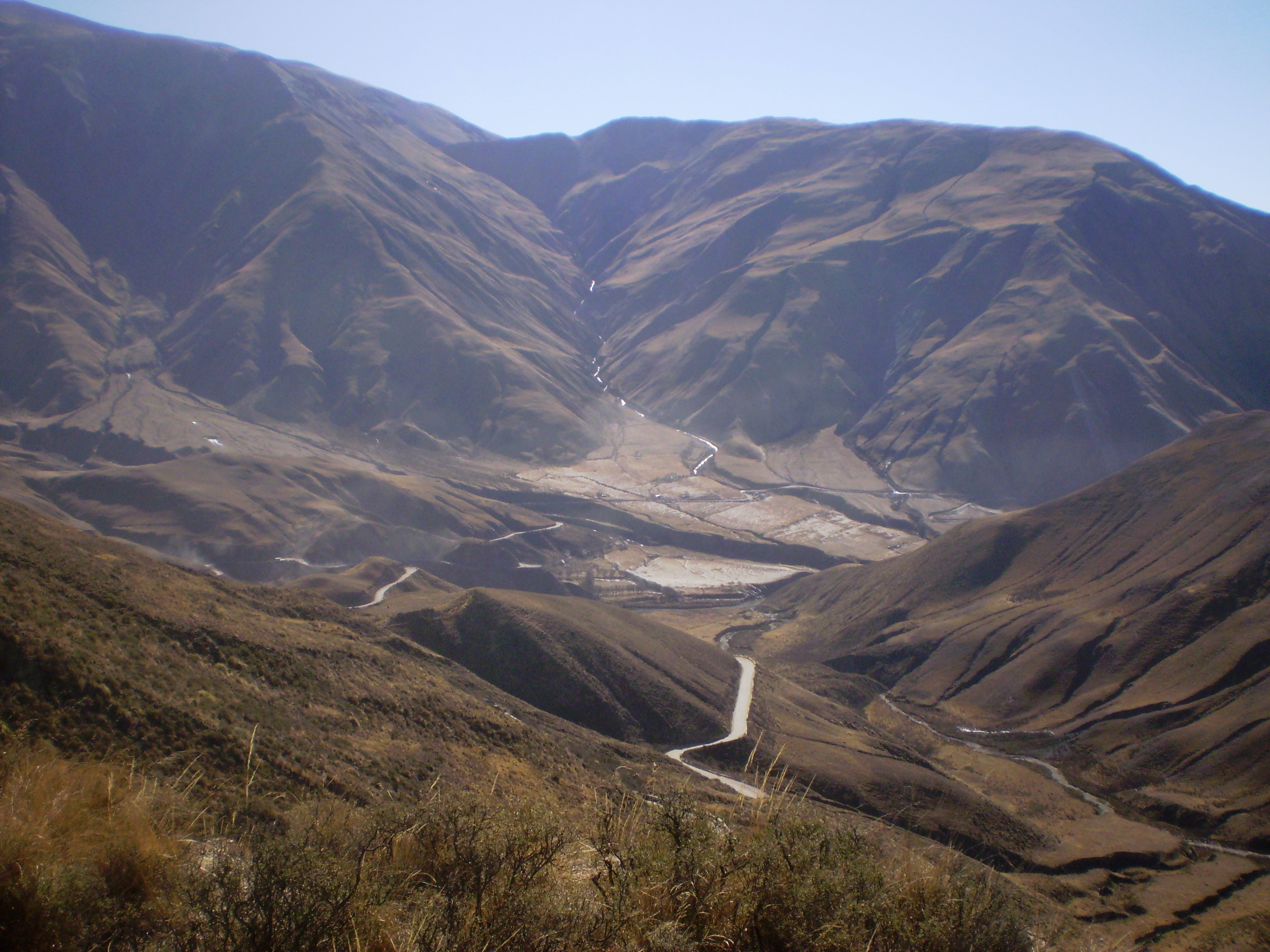 Parque Nacional Los Cardones, Salta, Argentina.